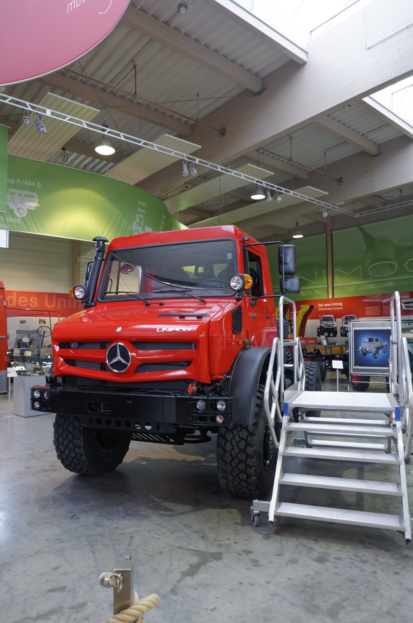 Gaggenau -Unimog-Museum